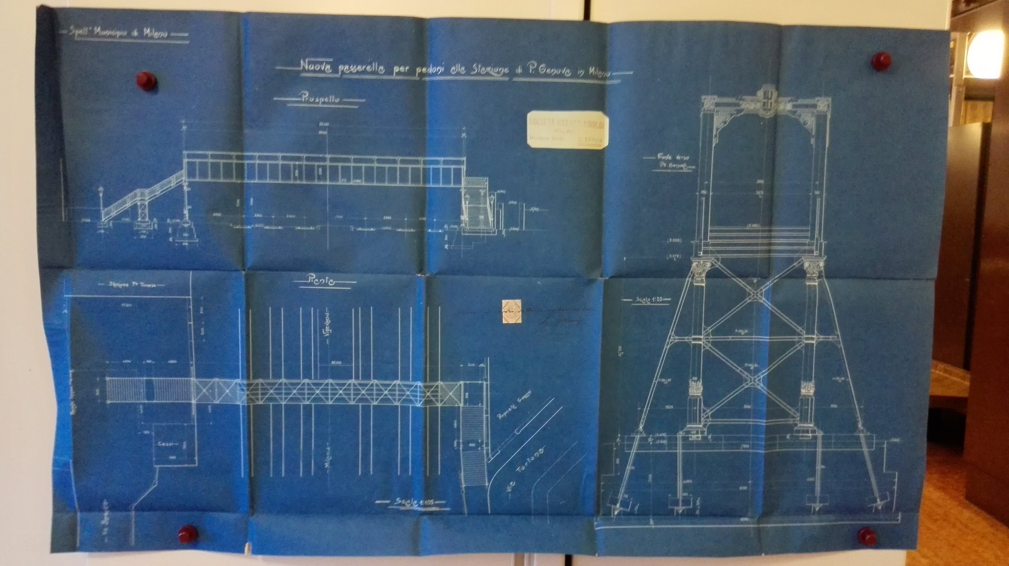 Disegni conservati al Castello Sforzesco di Milano